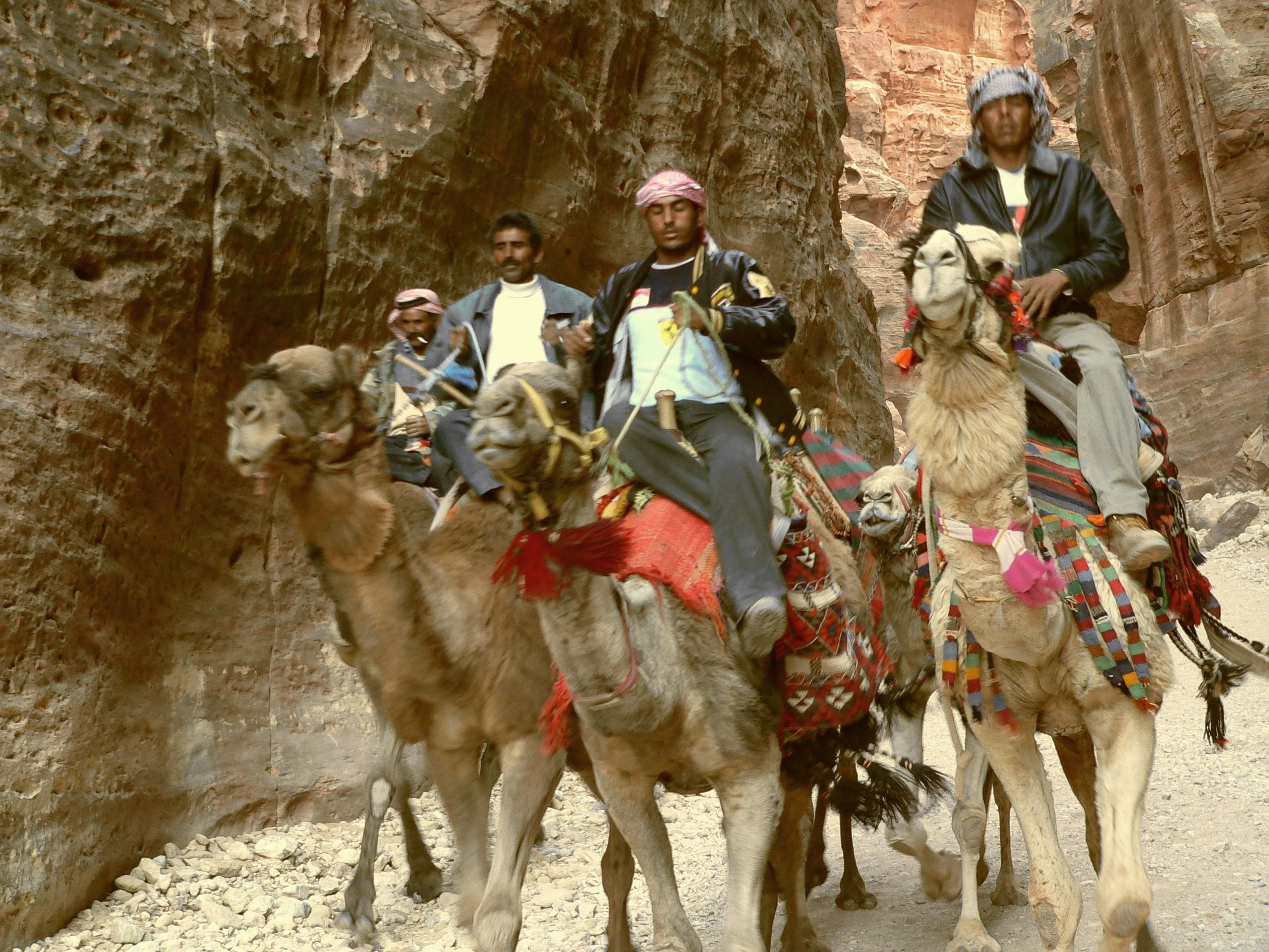 M Disdero 22/02/2007